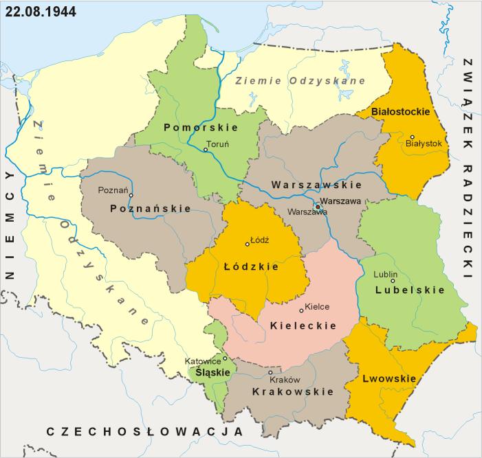 Podział administracyjny Polski w dniu 22 sierpnia 1944 Administrative division of Poland as of August 22, 1944